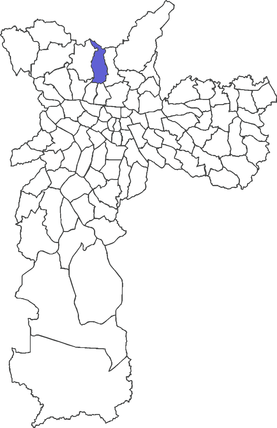 Localização do distrito de Cachoeirinha no município de São Paulo.